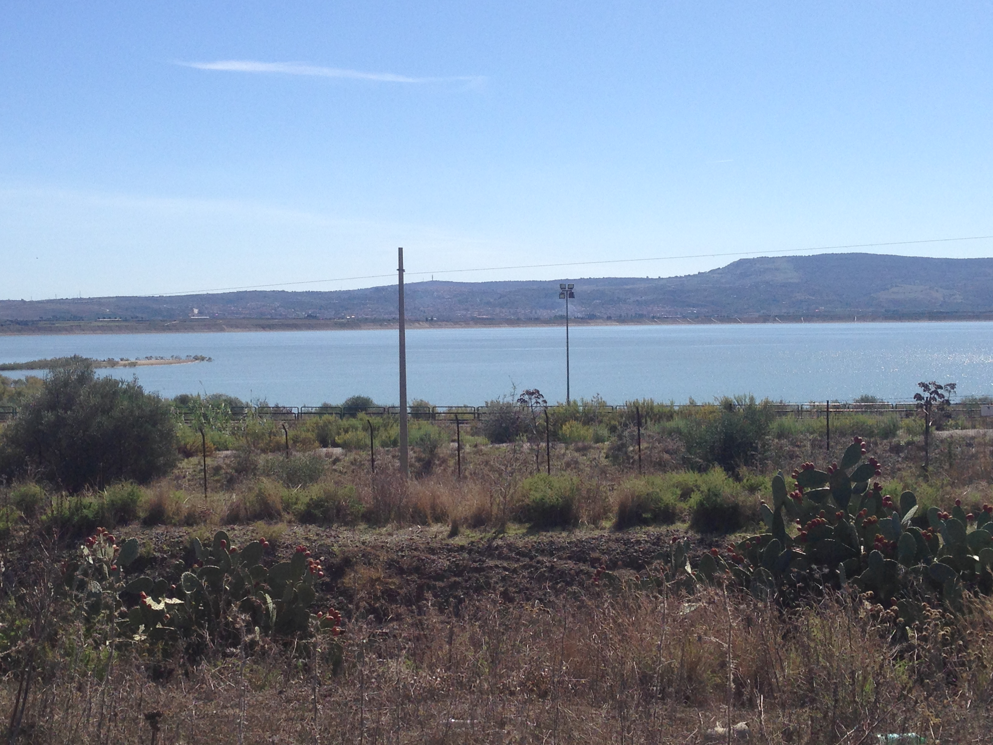 Il biviere dalla SS 385